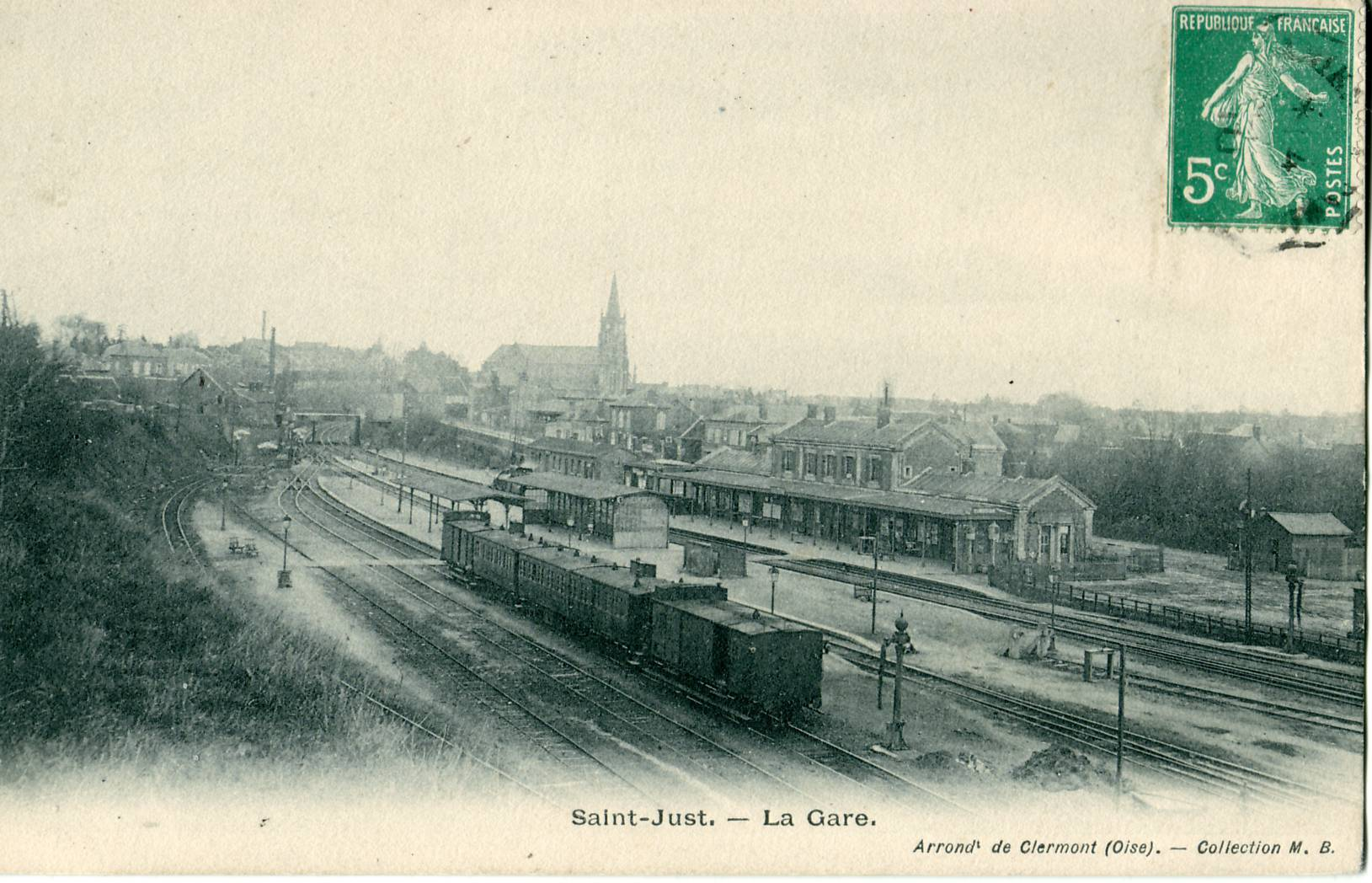 Carte postale ancienne éditée par MB SAINT-JUST EN CHAUSSEE - La GareLe quai le plus à gauche est celui de la ligne à voie métrique Estrées-Saint-Denis - Froissy - Crèvecœur-le-Grand